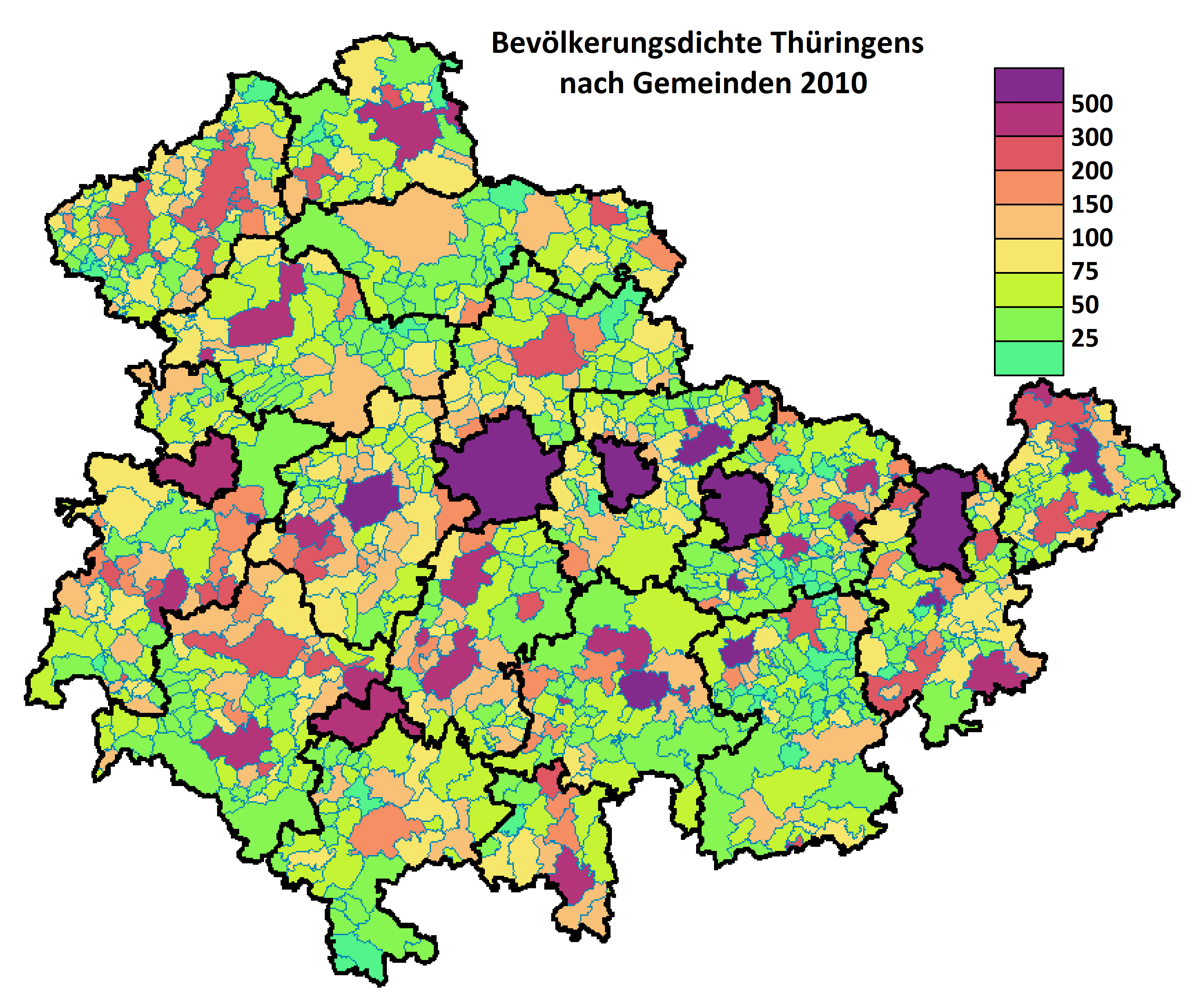 Karte der Bevölkerungsdichte sämtlicher Gemeinden Thüringens zum 31. Dezember 2010.